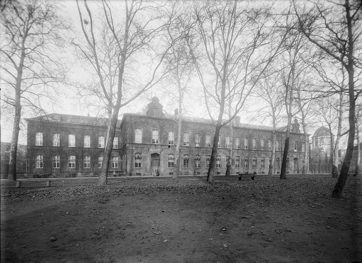 Vroegere godshuis (huidig Hof van Egmont) in Mechelen